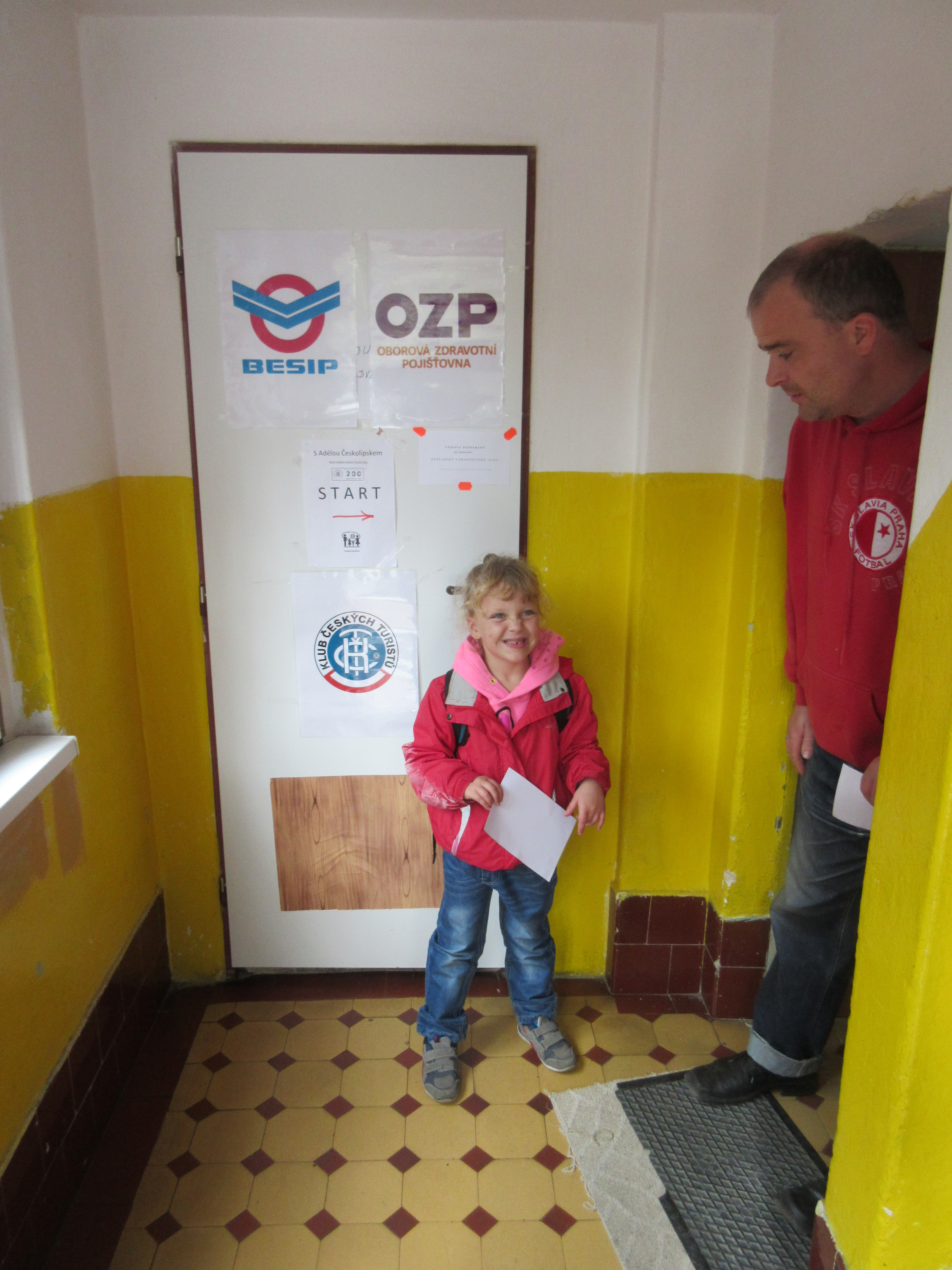 Chodba v Adéle, bannery akce S Adélou Českolipskem